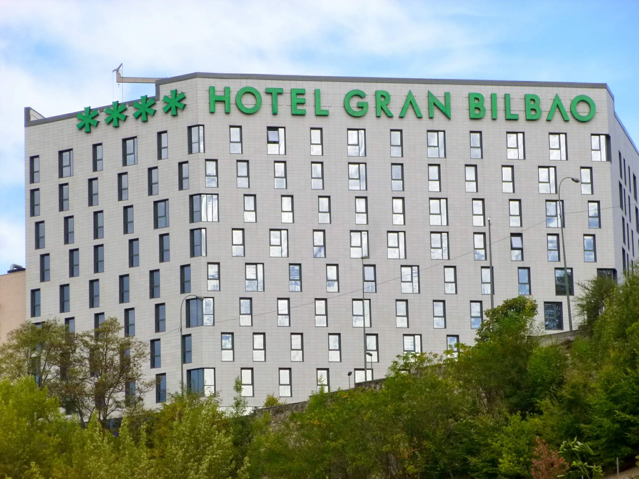 Hotel Gran Bilbao, en el barrio bilbaíno de Santutxu